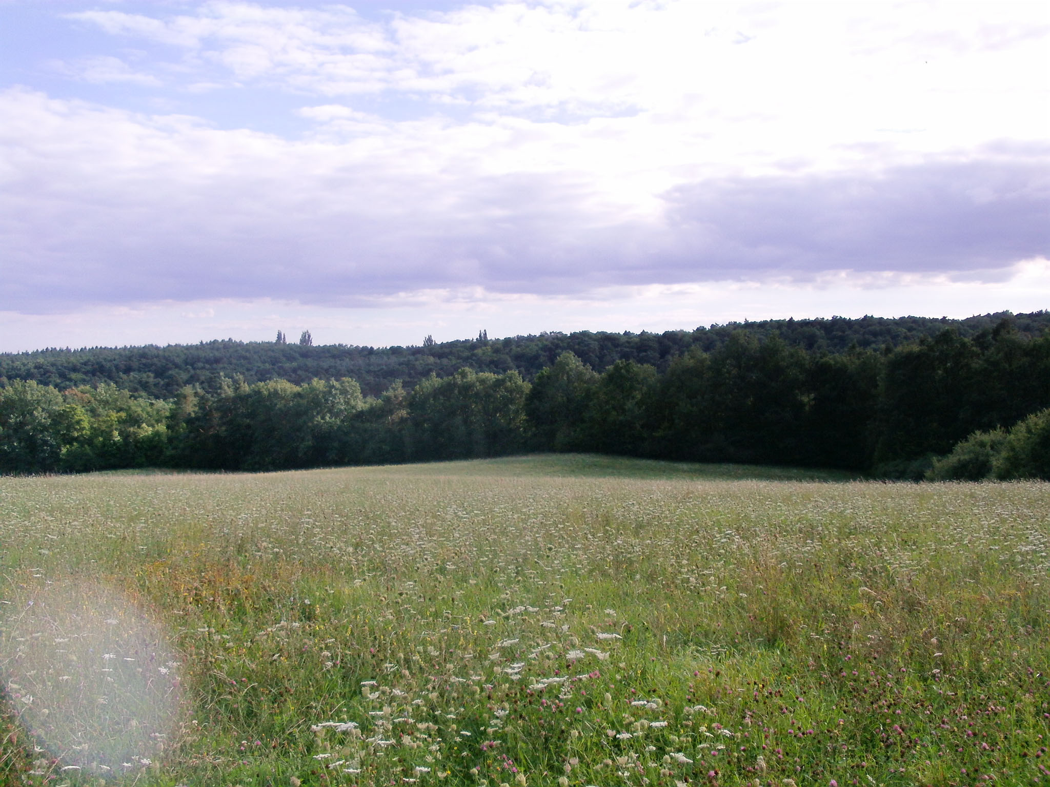 polana w Mosinie